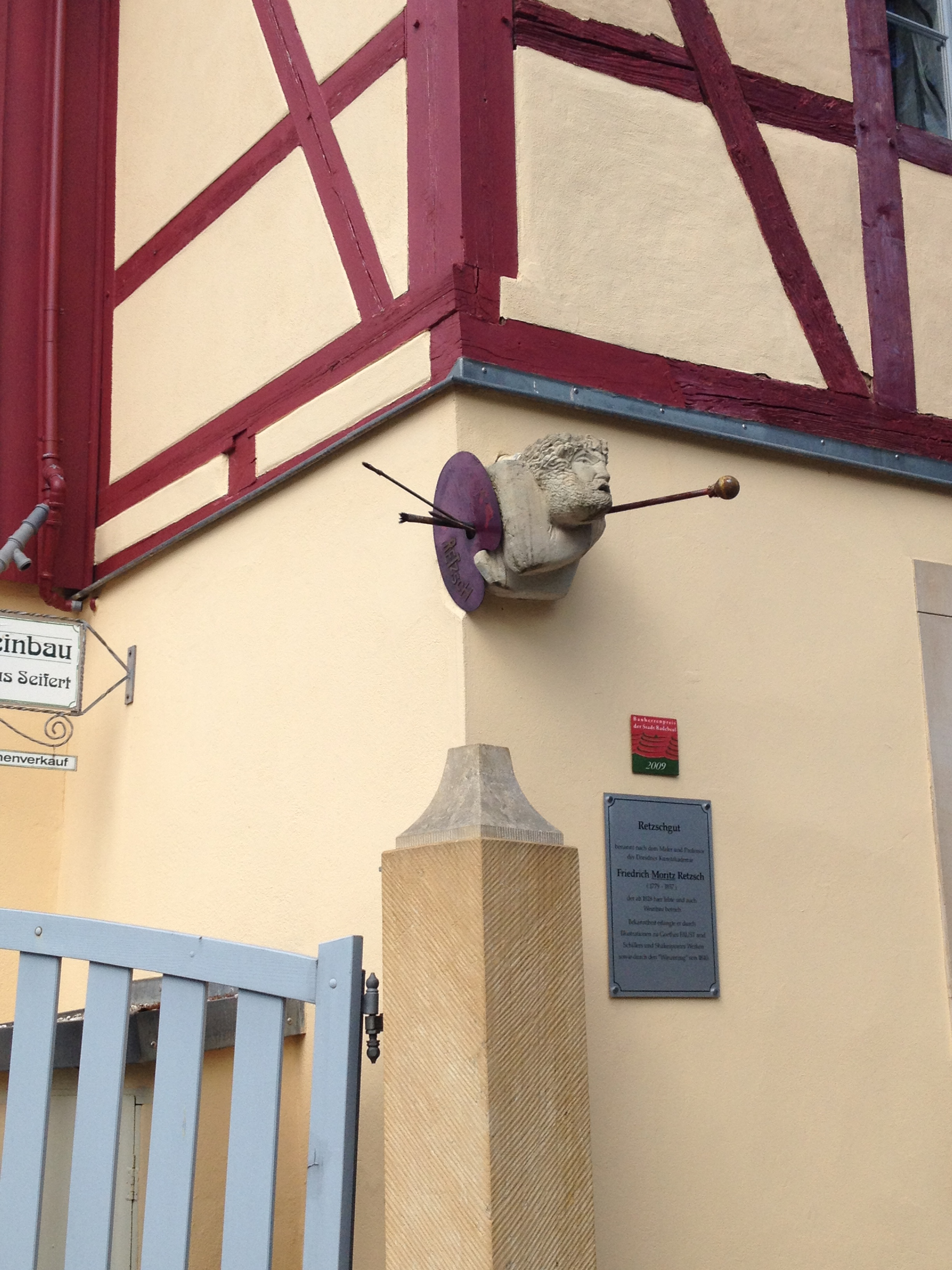 Radebeul Retzschgut